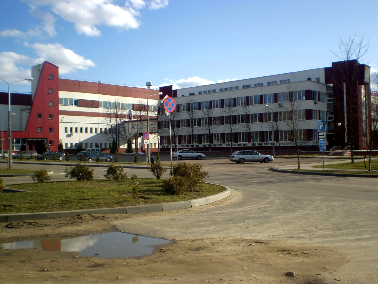 РУП «Гефест-тэхніка»